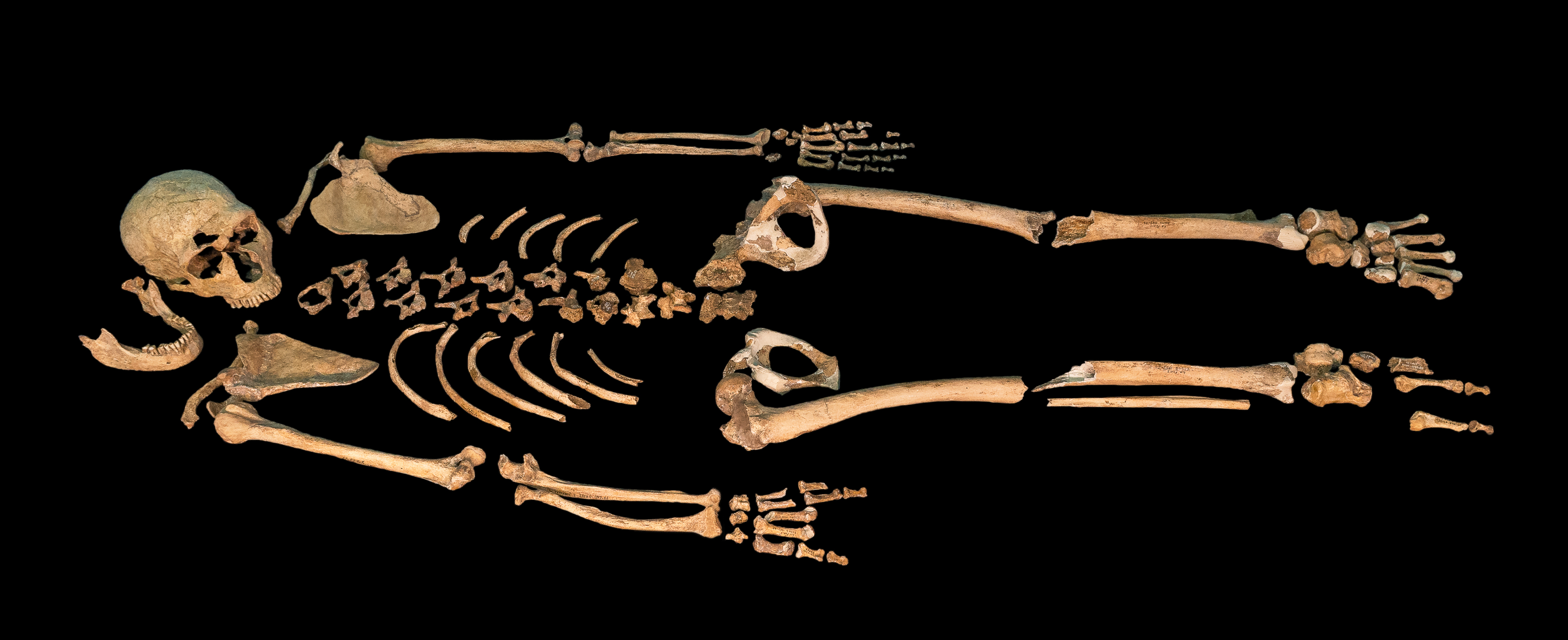 La Ferrassie 1, eines der vollständigsten Skelette eines erwachsenen Neandertalers, entdeckt 1909 im Grand Abri de La Ferrassie. Original, Museé de l'Homme Paris, Ausstellung "Néandertal" 28 März 2018 bis 7. Januar 2019.